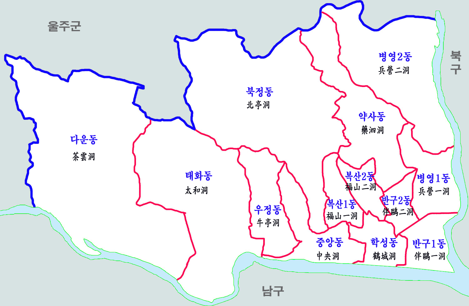 울산시 중구 행정구역도